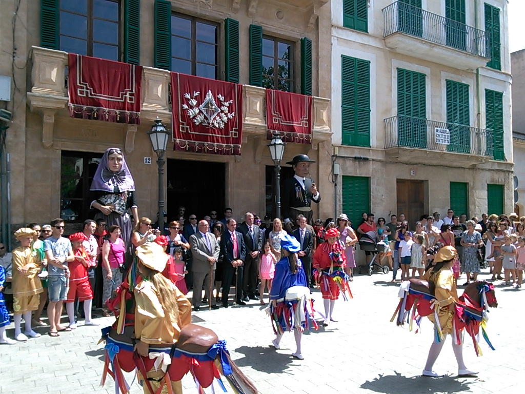 Cavallets cotoners ballant davant l'ajuntament de Llucmajor el dia de Santa Càndida